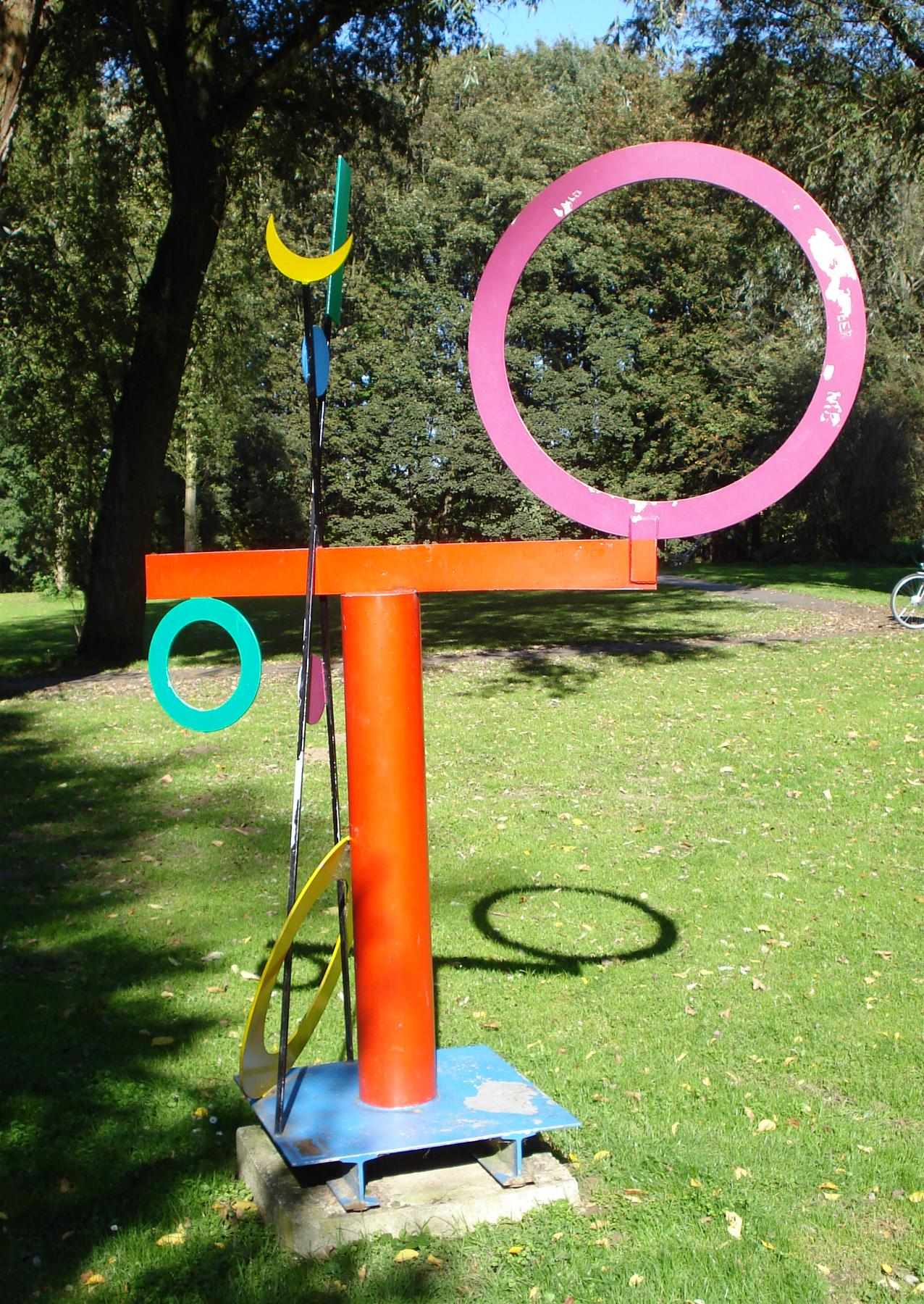 Beeldenpark Zwijndrecht. Kunstwerk "Tegenstrijdige meningen" van Benbow Bullock. Zwijndrecht/The Netherlands. FOP.